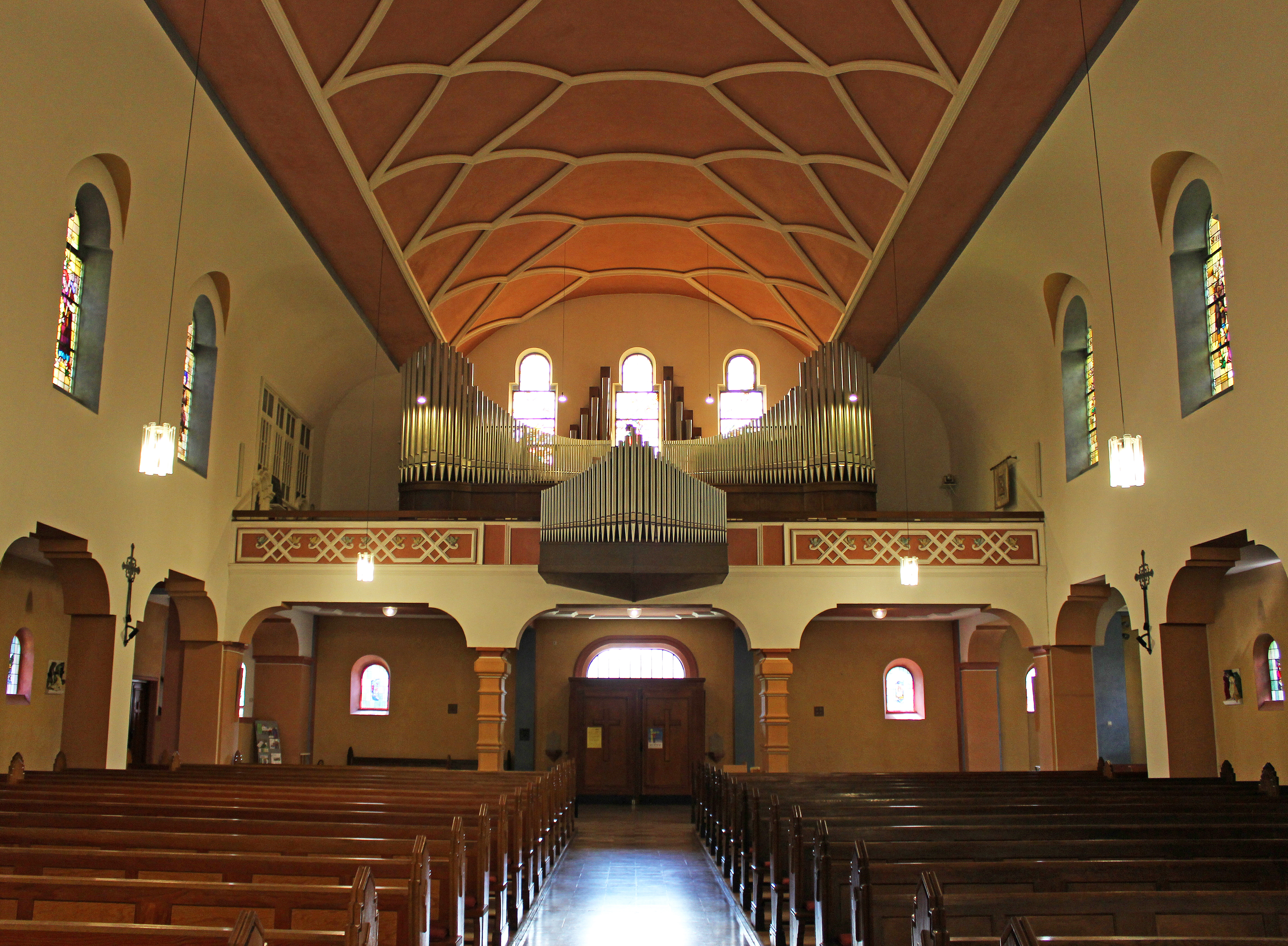 Blick ins Innere der katholischen Pfarrkirche St. Bonifatius in Überherrn, Landkreis Saarlouis, Saarland